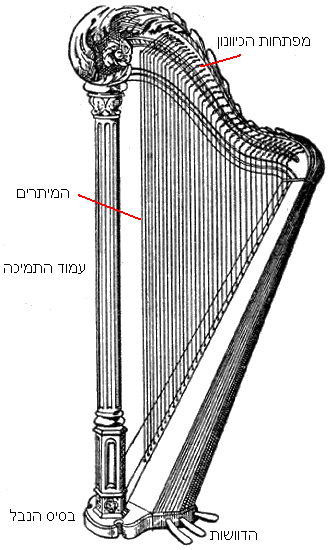 נבל.